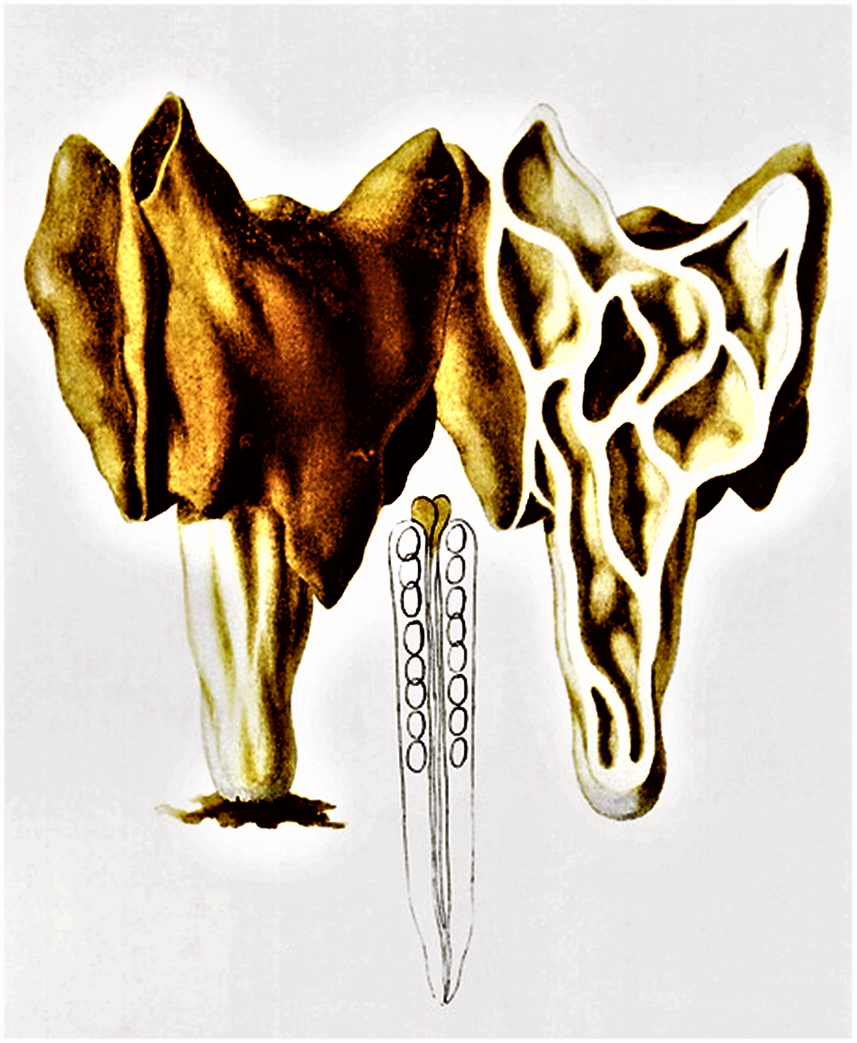 Giacomo Bresadola: Helvella infula (Schaeff. (1774), heute Gyromitra infula (Schaeff.) Quél. (1886)